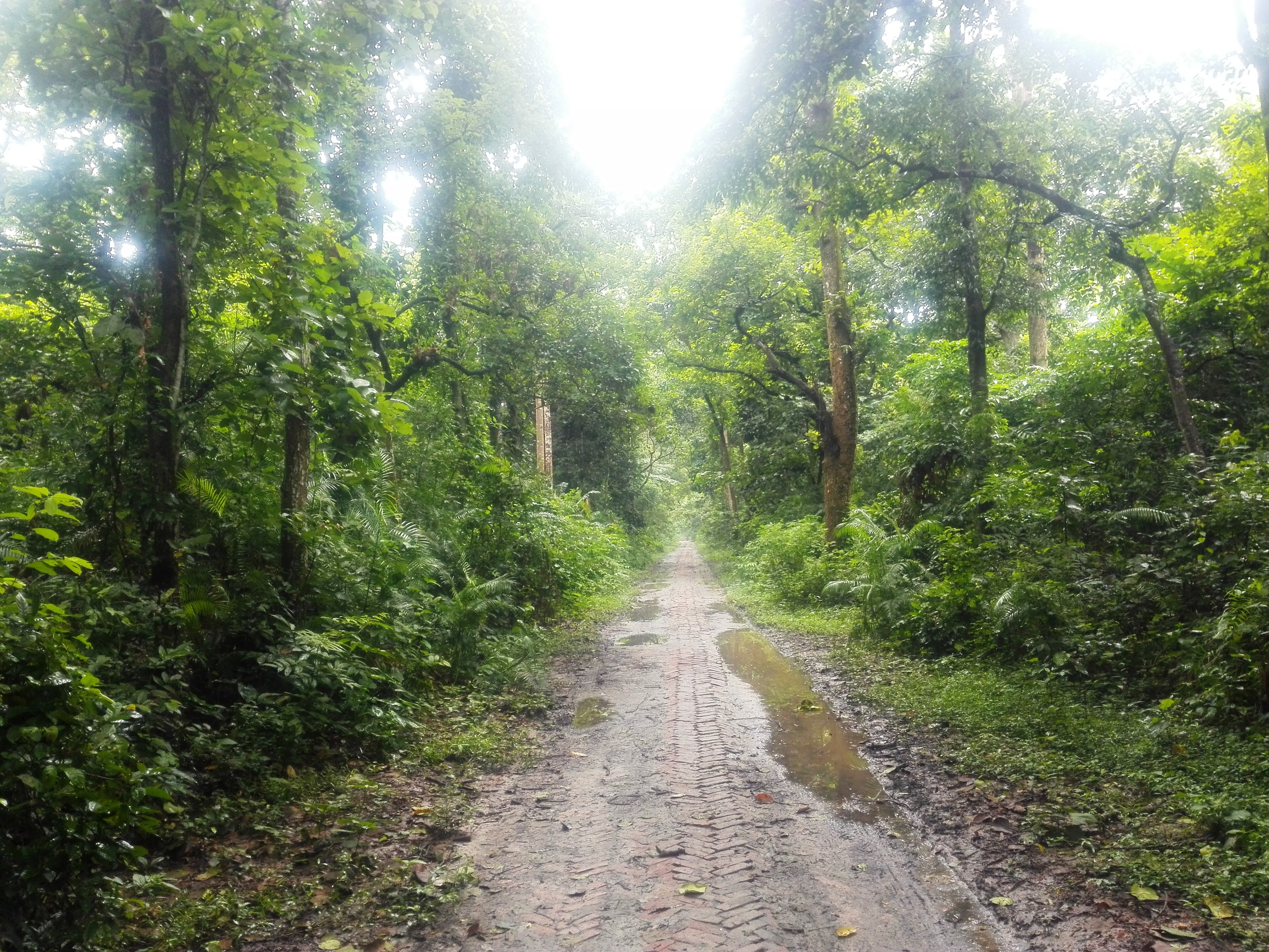 মধুপুর জাতীয় উদ্যানের প্রধান ফটক থেকে বনের মধ্যে ইট বাঁধানো পায়ে চলার পথ। এই পথ ধরে হরিণ প্রজনন কেন্দ্রে যাওয়া যায়।